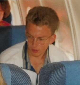 Otto Kärki lentokoneessa matkalla yleisurheilun Euroopan-mestaruuskilpailuihin Budapestiin 17. elokuuta 1998.